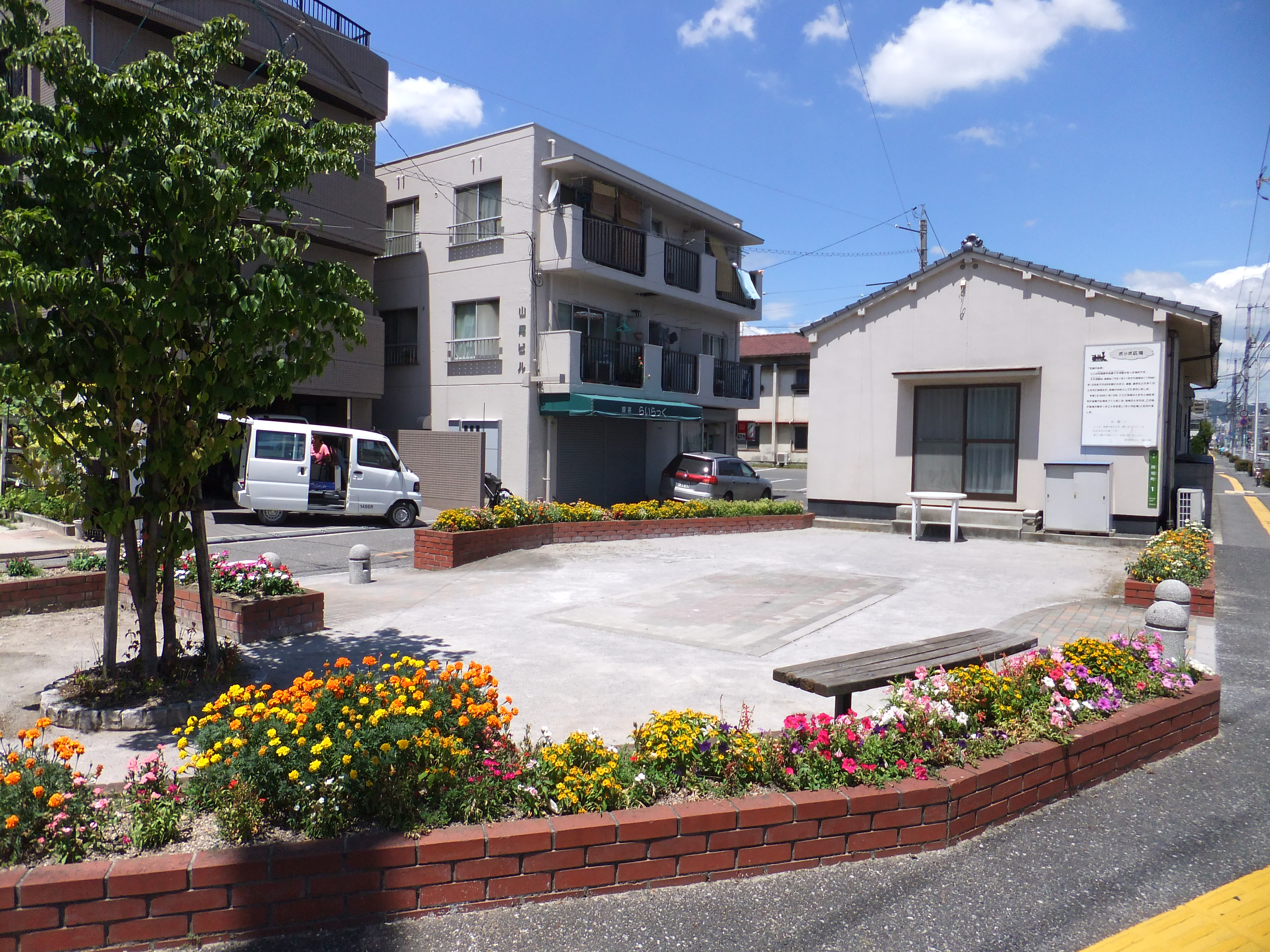 日本国有鉄道 宇品線 下大河駅 跡